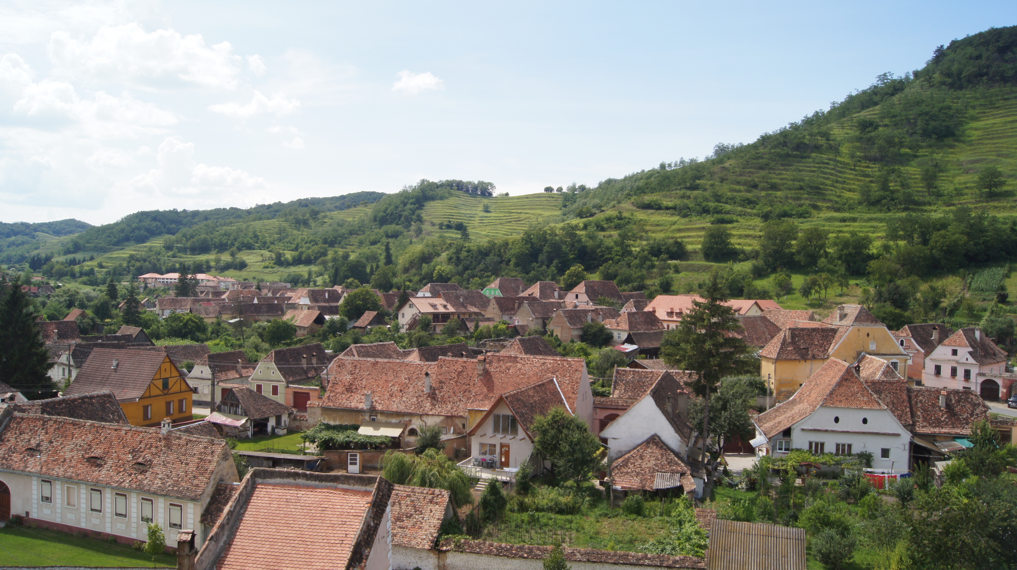 Așezare rurală 02